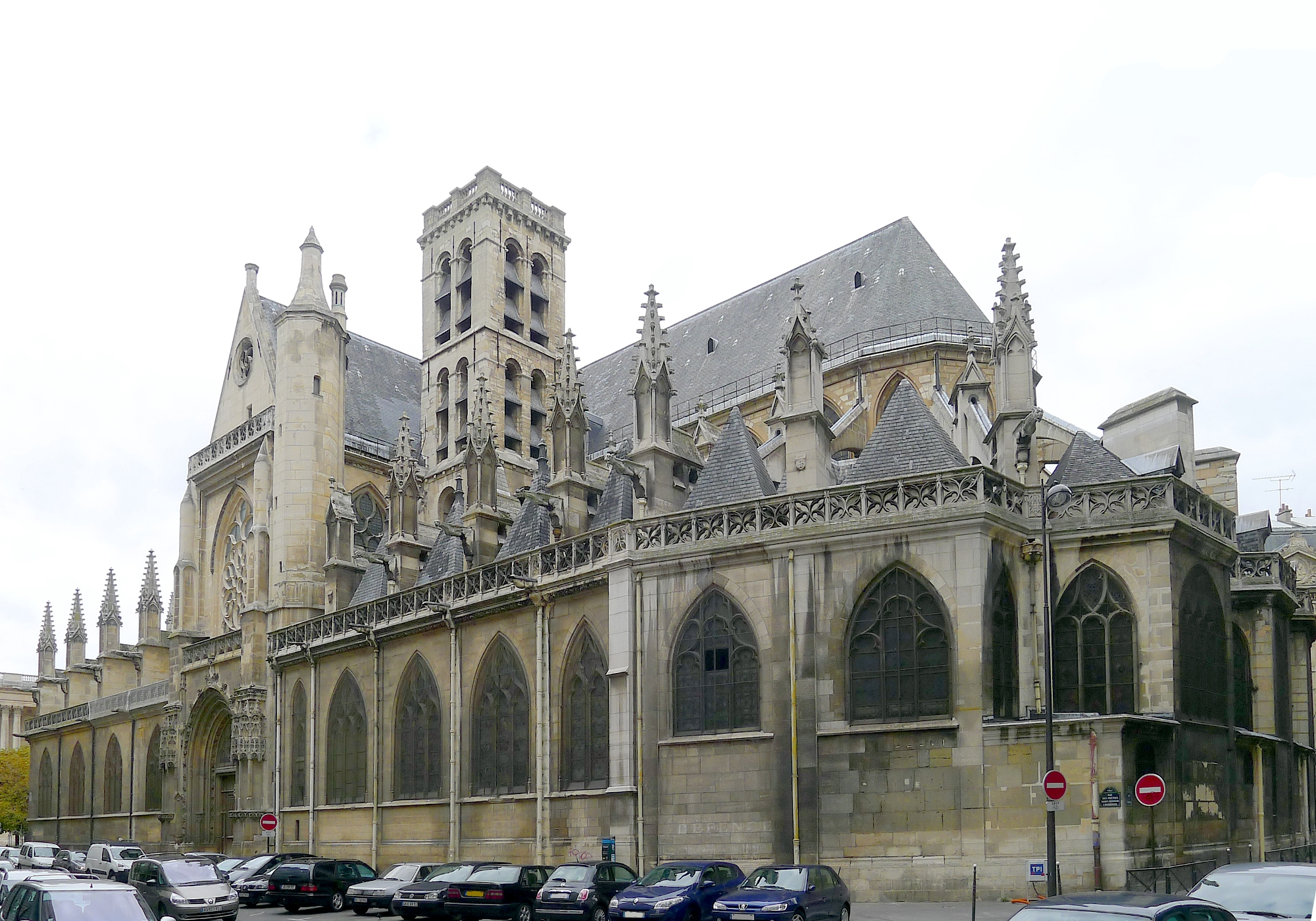 Église Saint-Germain-l'Auxerrois de Paris (vue du sud-est) - Paris Ier